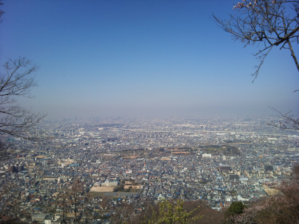 河内飯盛山からの眺め